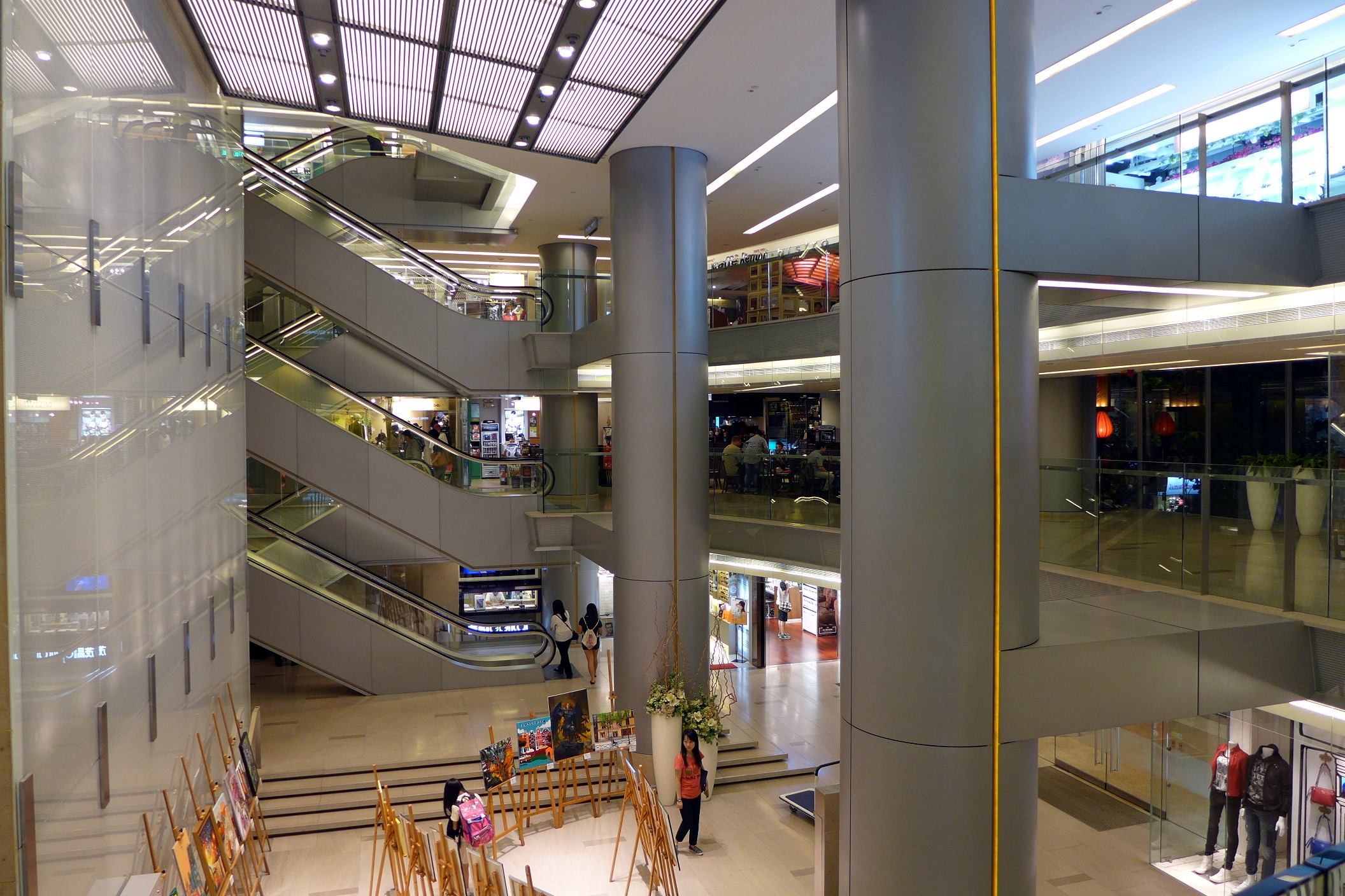 Tai Yau Plaza Void